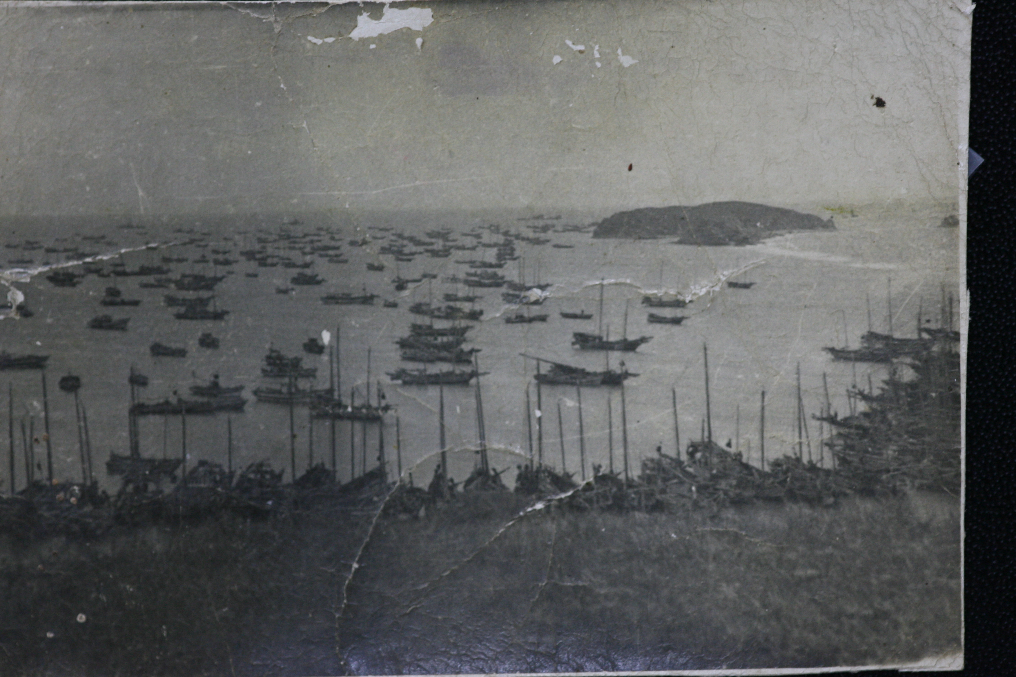 1960년06월 연평도 고기잡이배 , 조기잡이는 4월 초에 시작 12월 중순까지다.